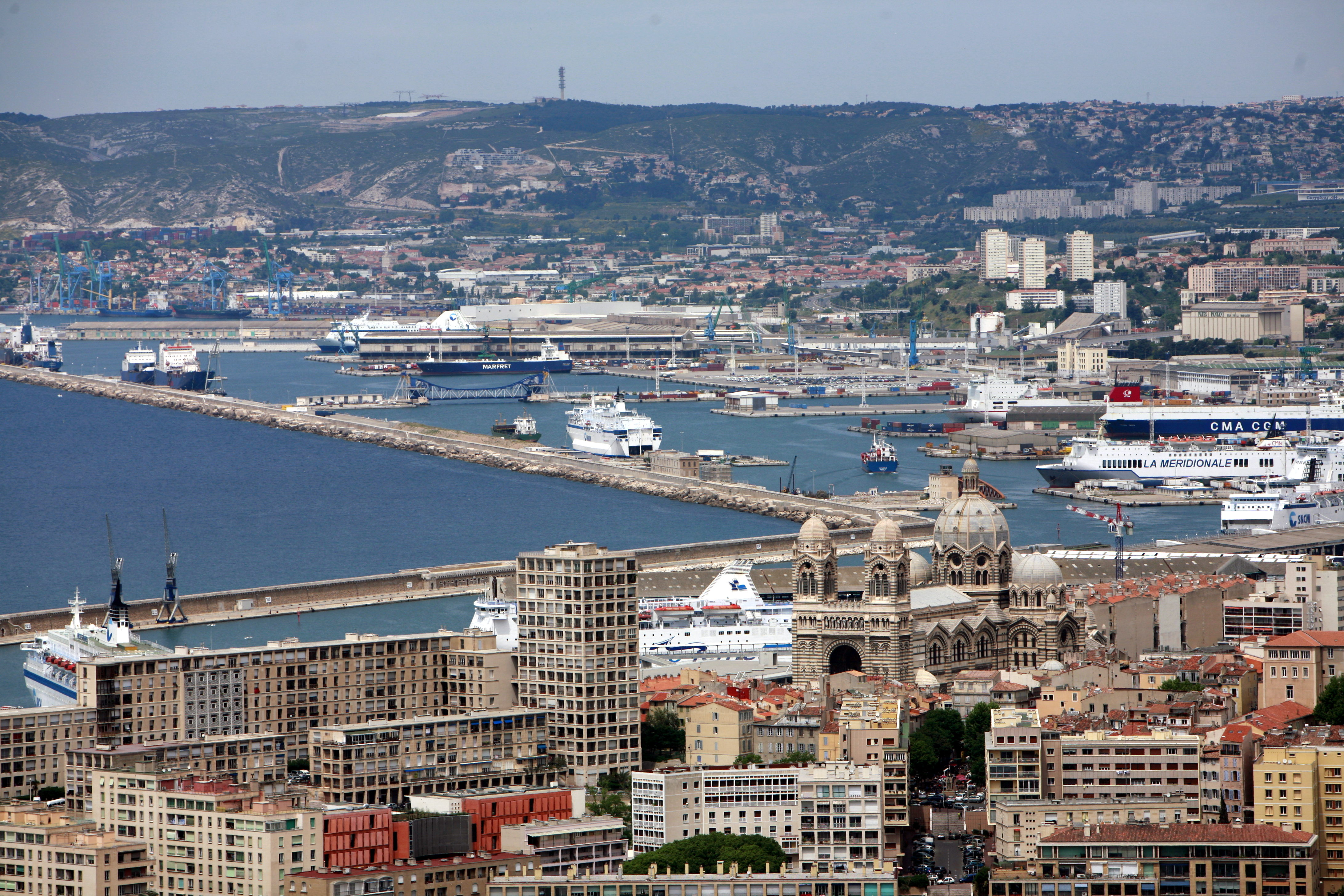 Marseille harbour